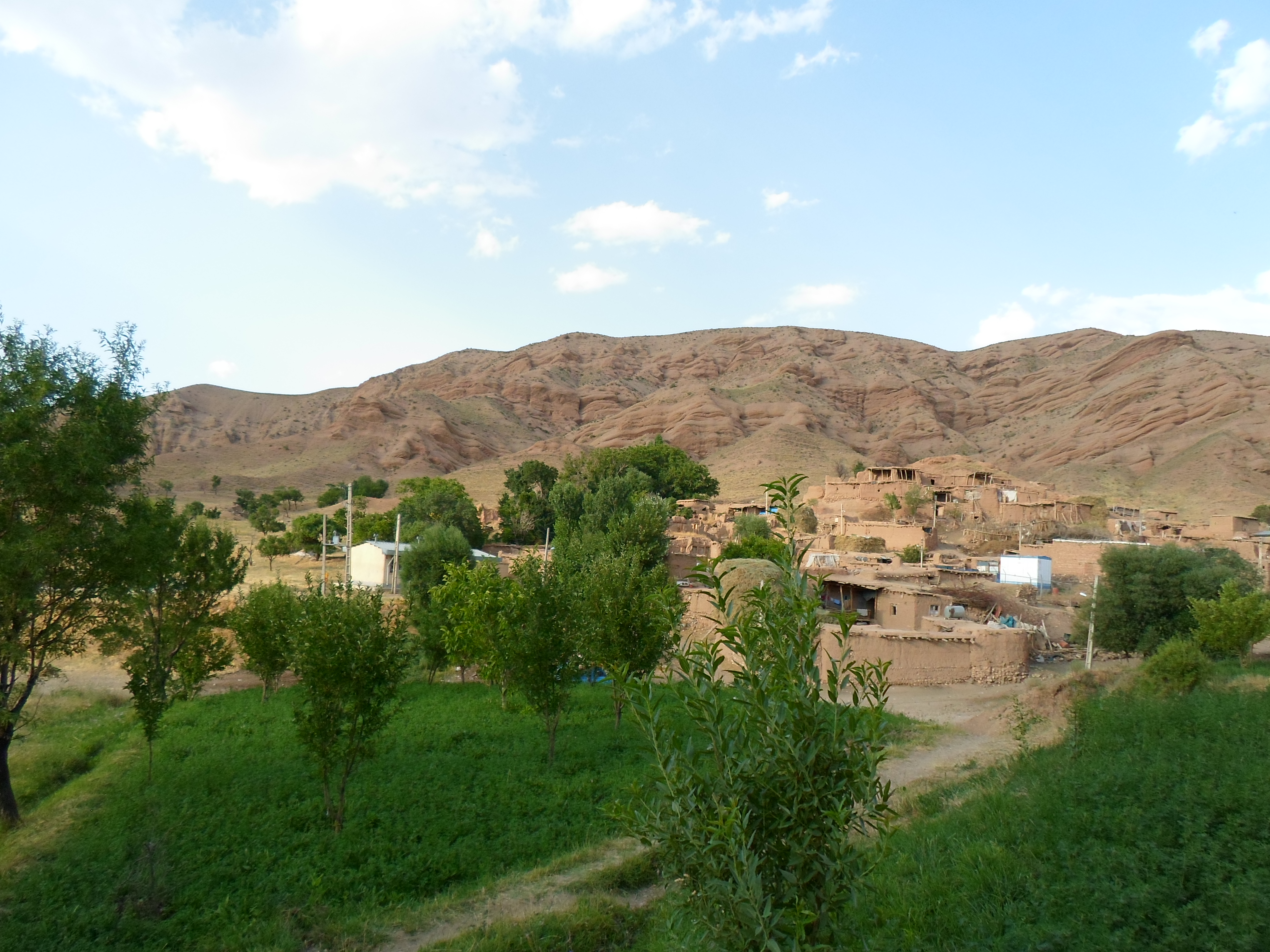 نمایی از روستای میلاق